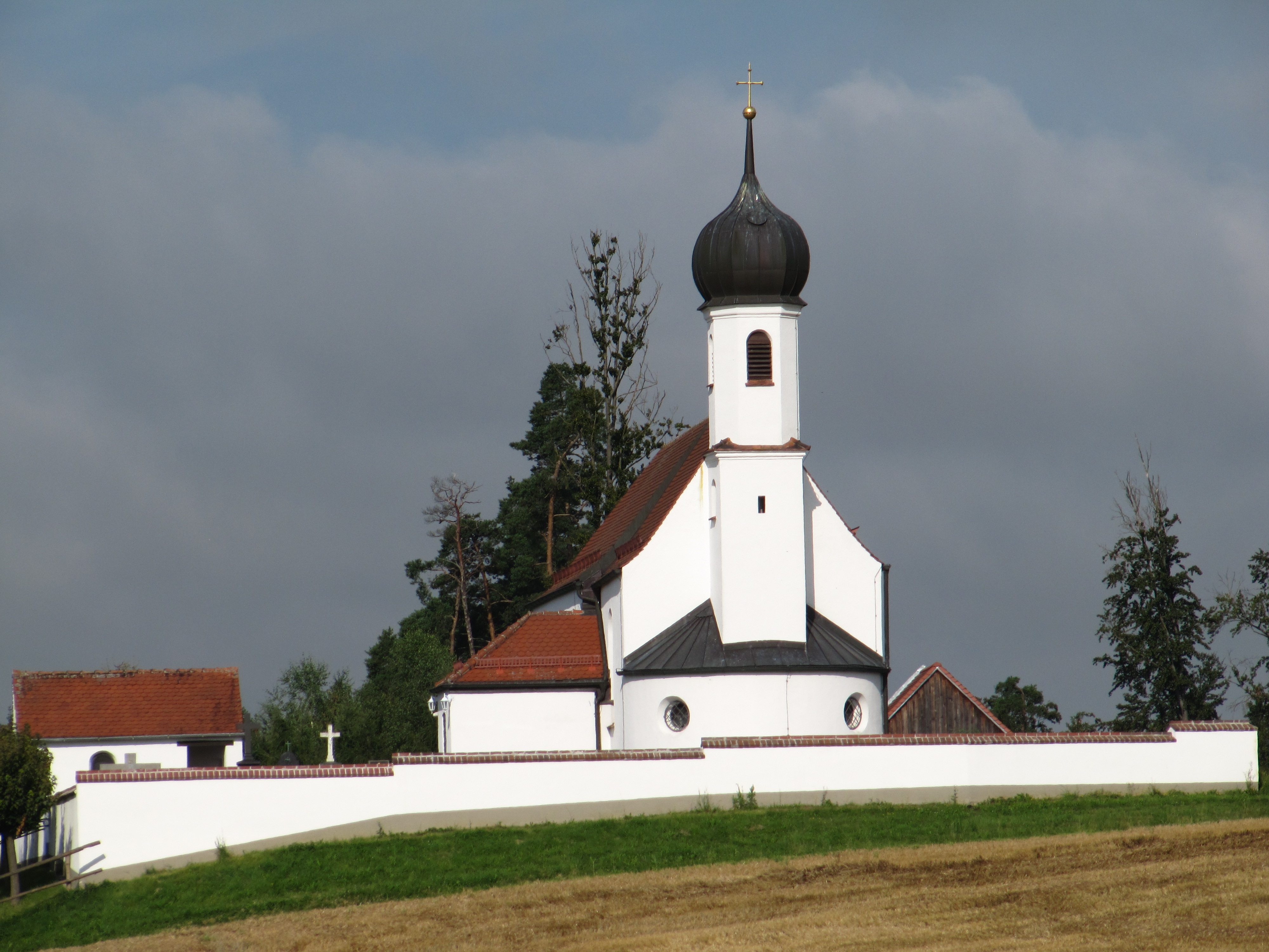 Katholische Pfarrkirche St. Vitus, 86551 Edenried